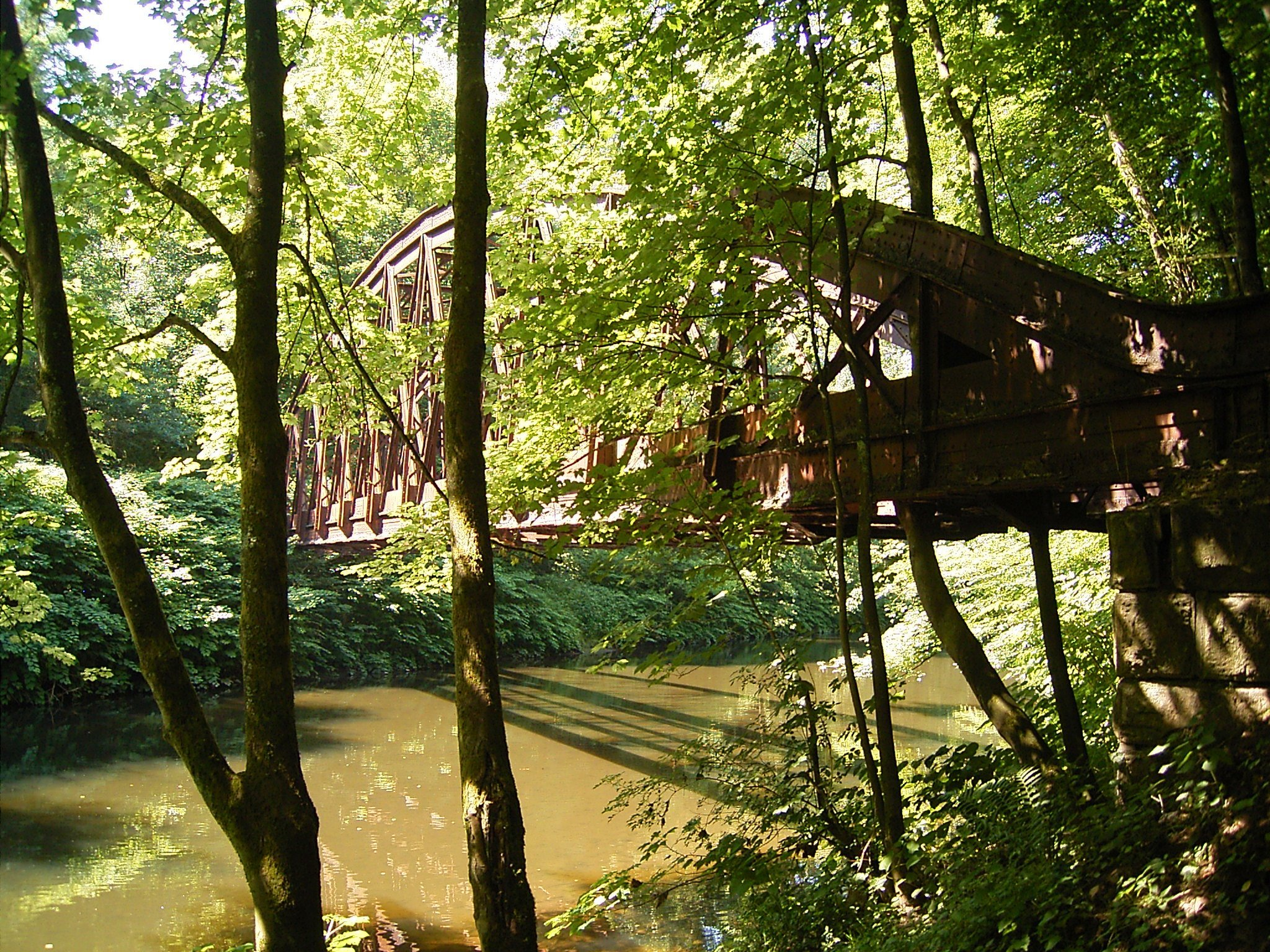 Wupperbrücke RME in Wuppertal / Solingen